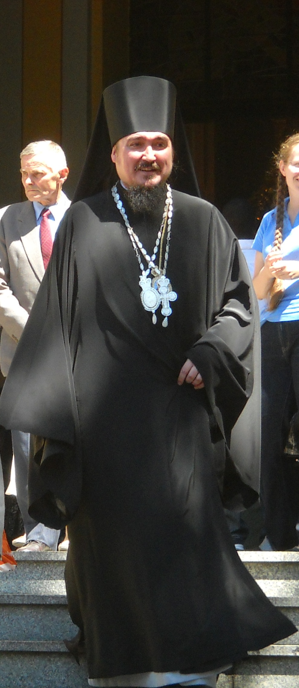 Biskup siemiatycki Jerzy (Pańkowski)